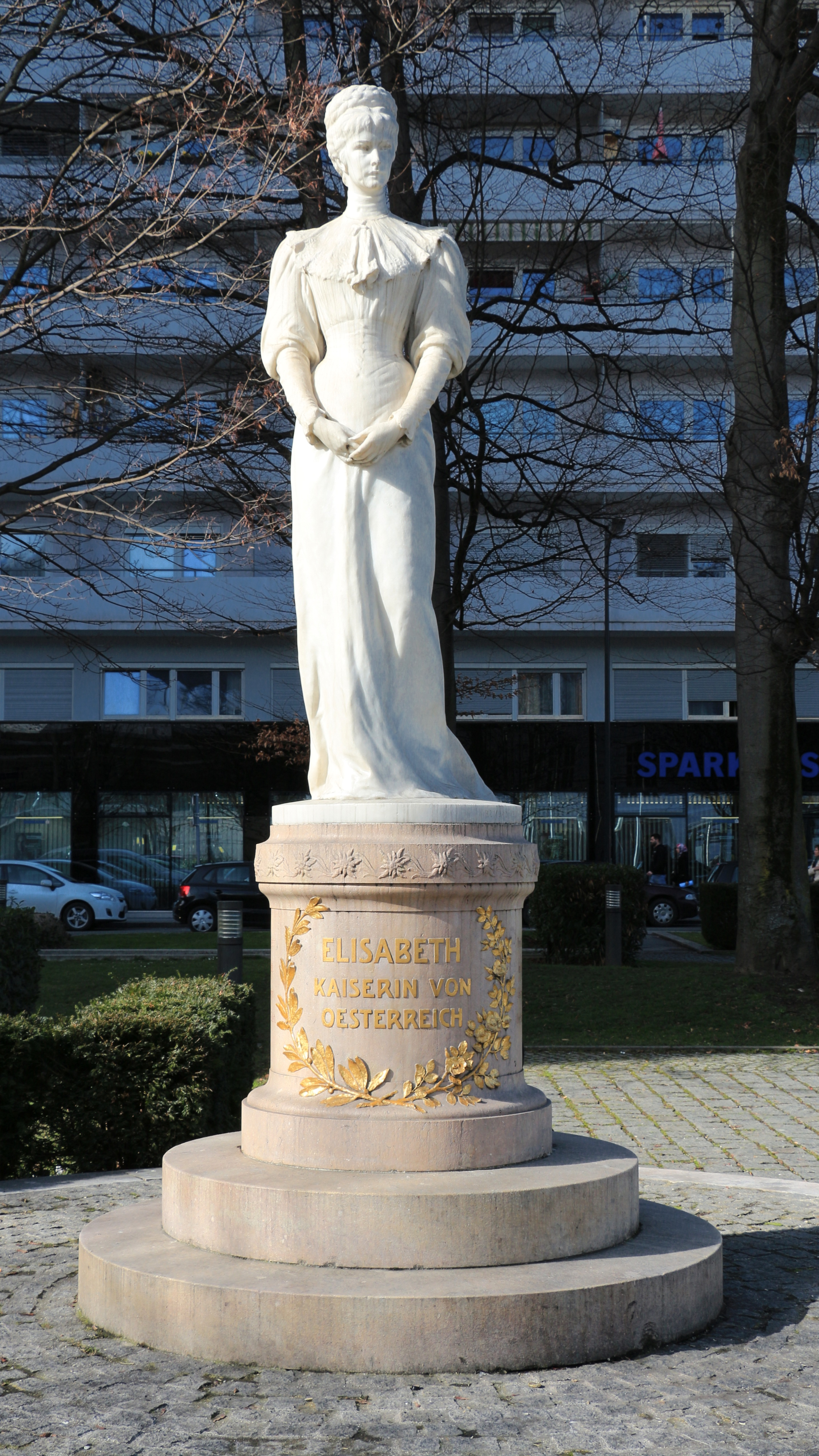 Statue von Elisabeth von Österreich ("Sissy") auf dem Südtirolerplatz in Salzburg.